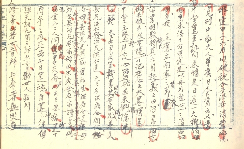 李秀成在1864年所作親供手跡